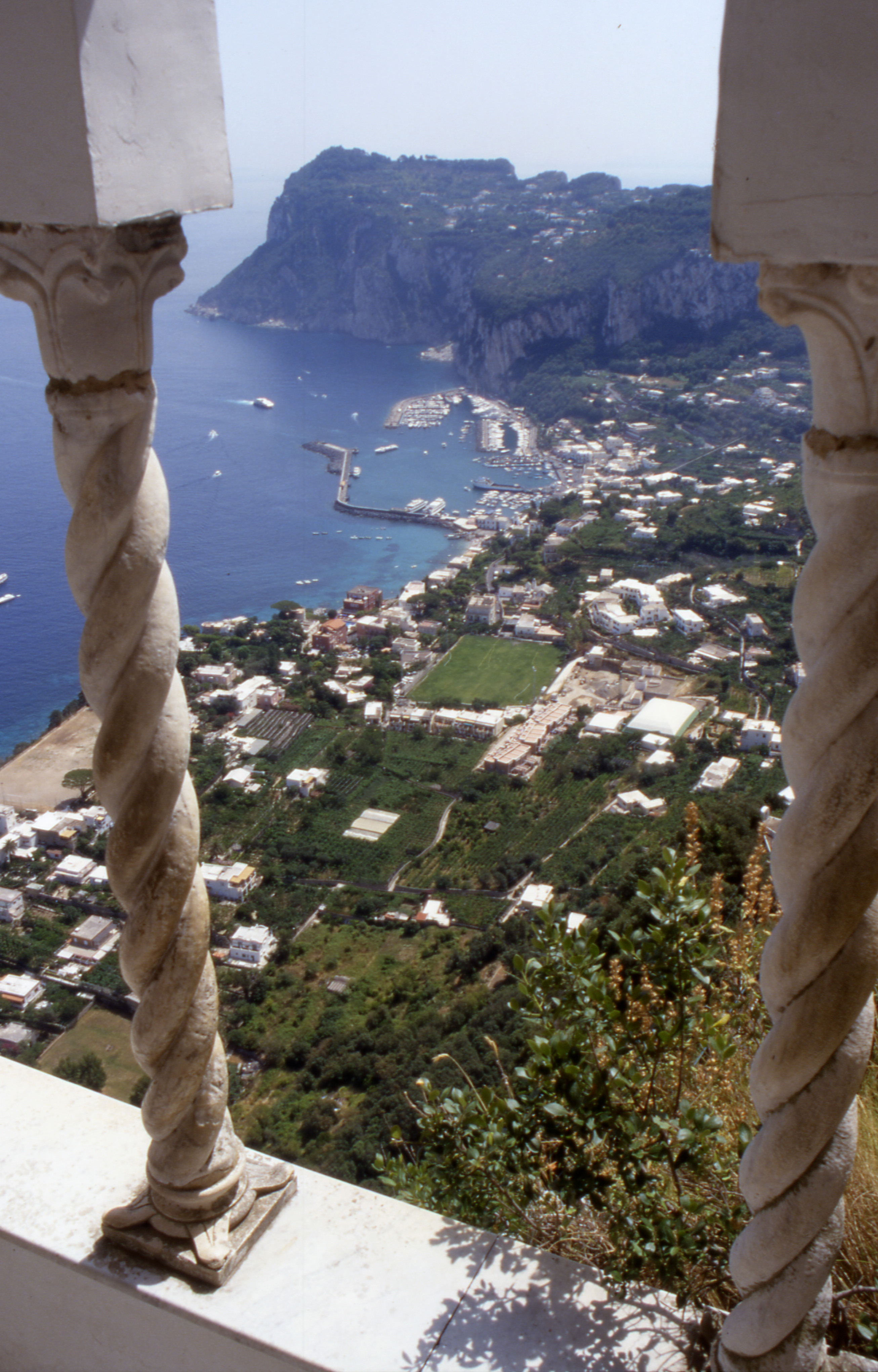 Capri Ansicht